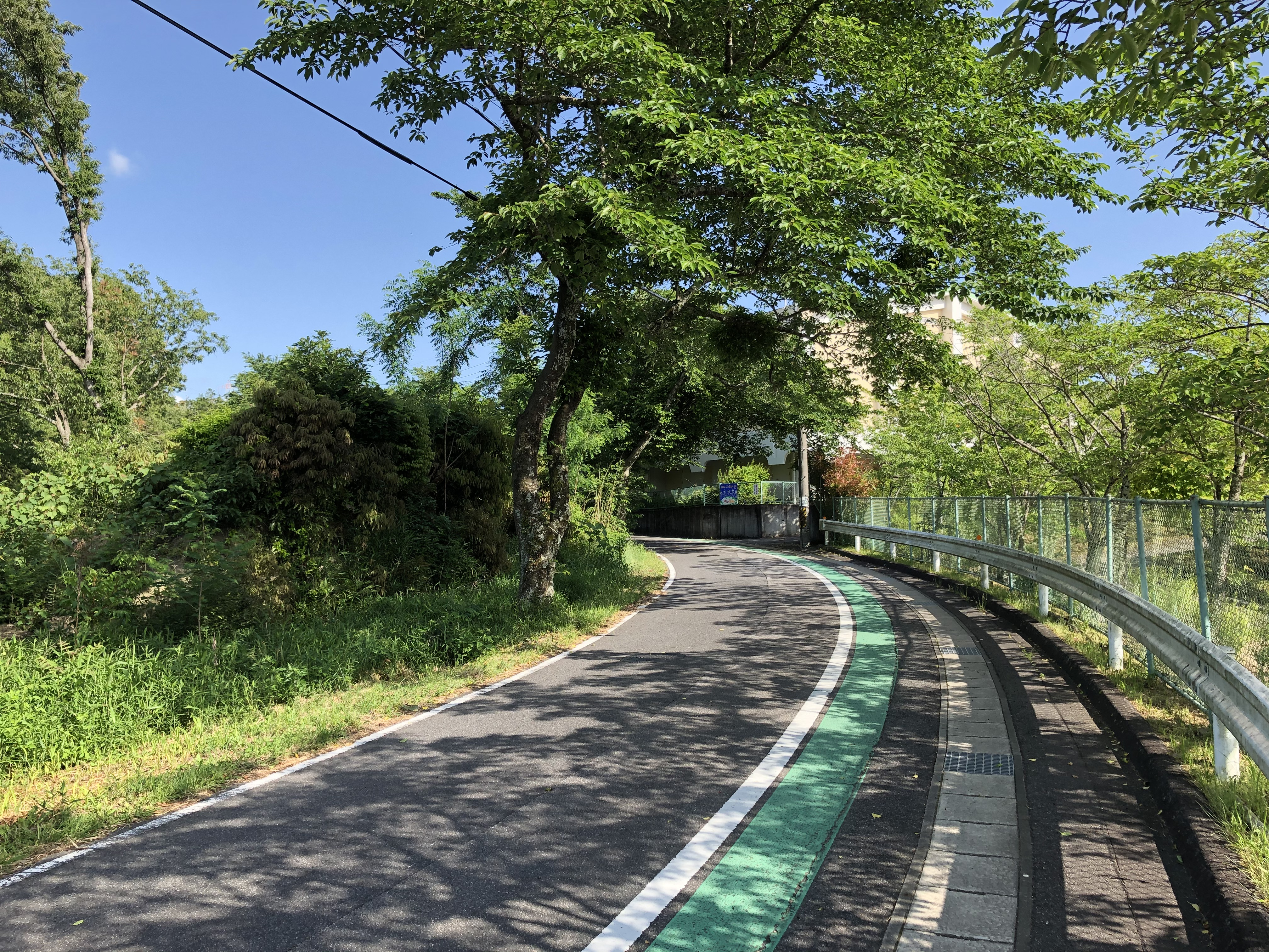 岡崎市立恵田小学校に隣接する道路。